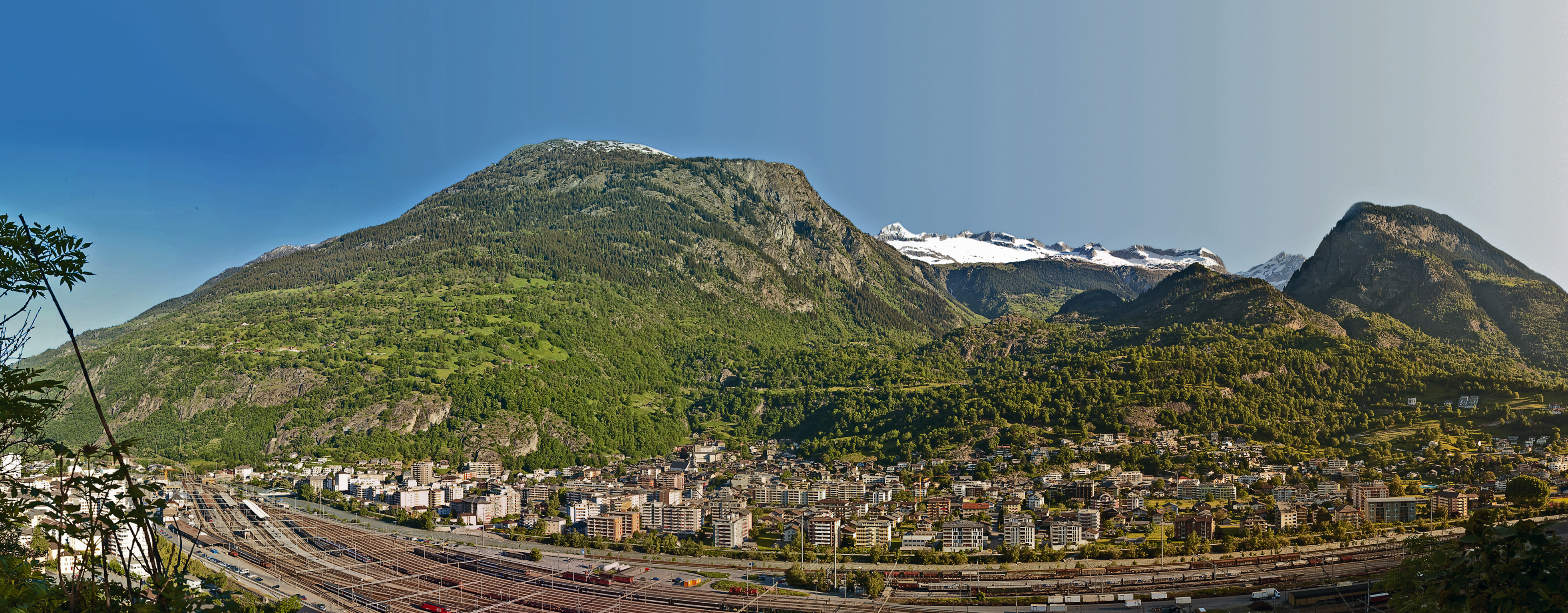 Panorama Naters mit Blattnerberg